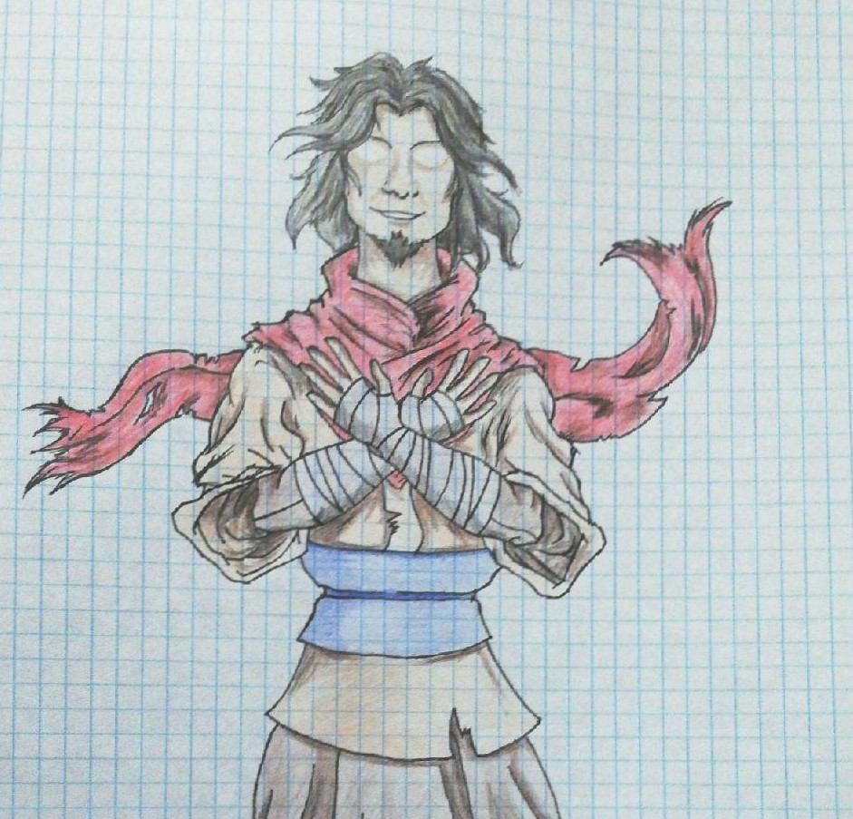 Este dibujo que hice muestra al personaje Wan de la serie Avatar: La leyenda de Korra mostrando su atuendo principal y su forma física.